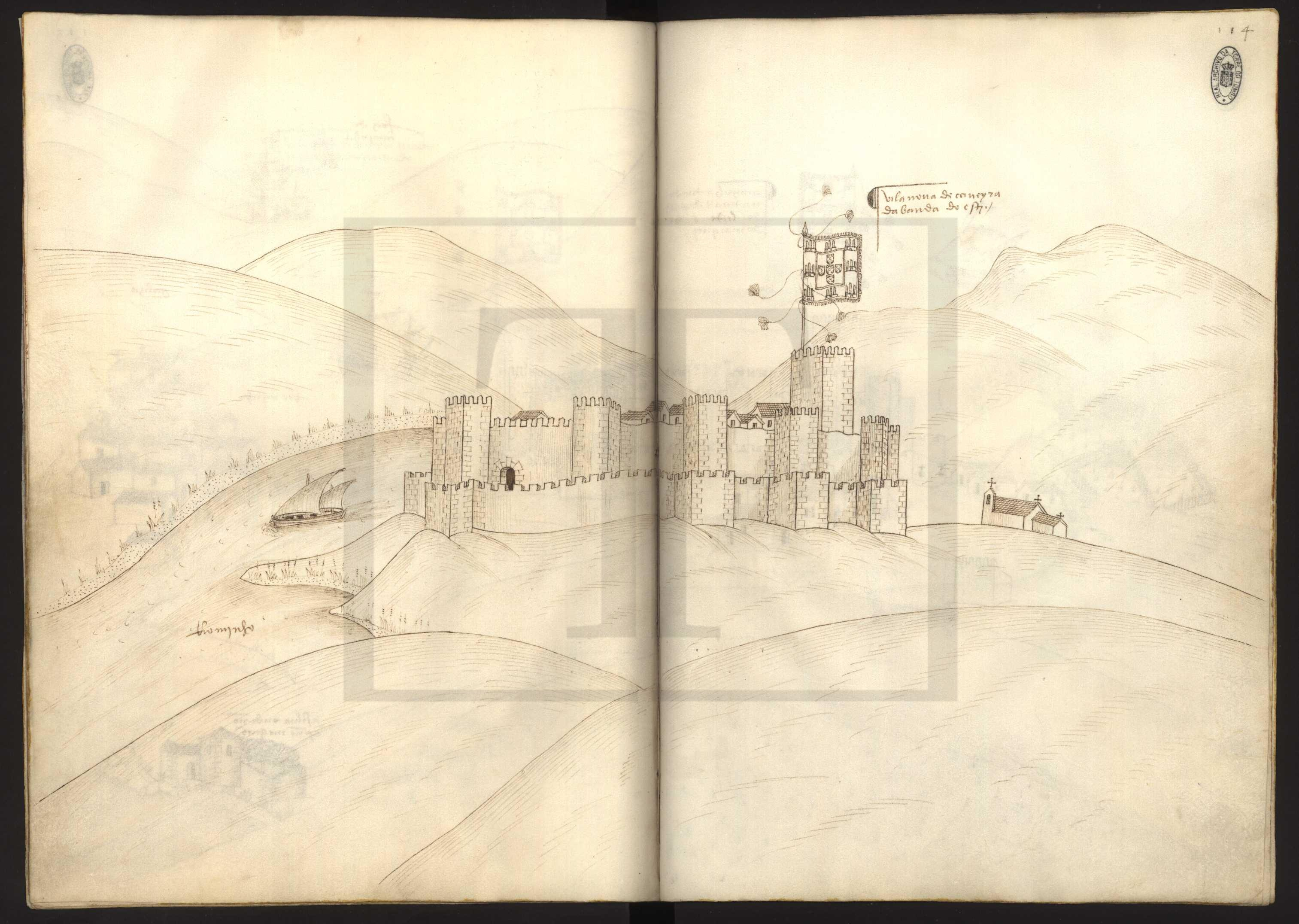 Livro das Fortalezas 114 - Vila Nova de Cerveira